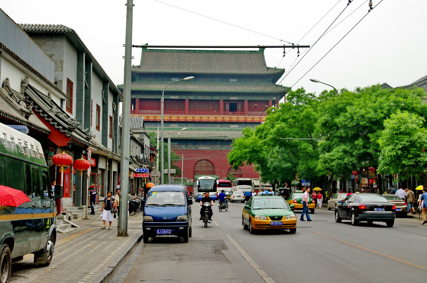 Straße zum Trommelturm, Peking